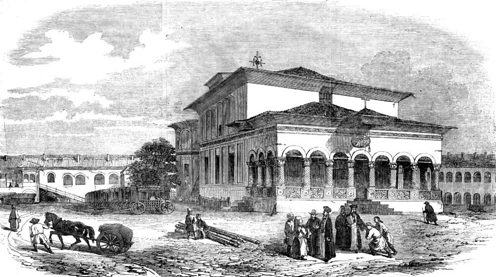 Sf. Gheorghe Nou, Bucharest (see also: File:Bukharest (Valachie), 13 juillet 1837 - Église de st. George.jpg)